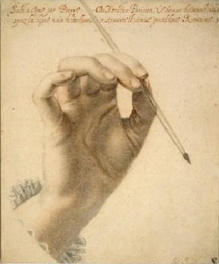 Pierre_Dumonstier,_Right_hand_of_Artemisia_Gentileschi